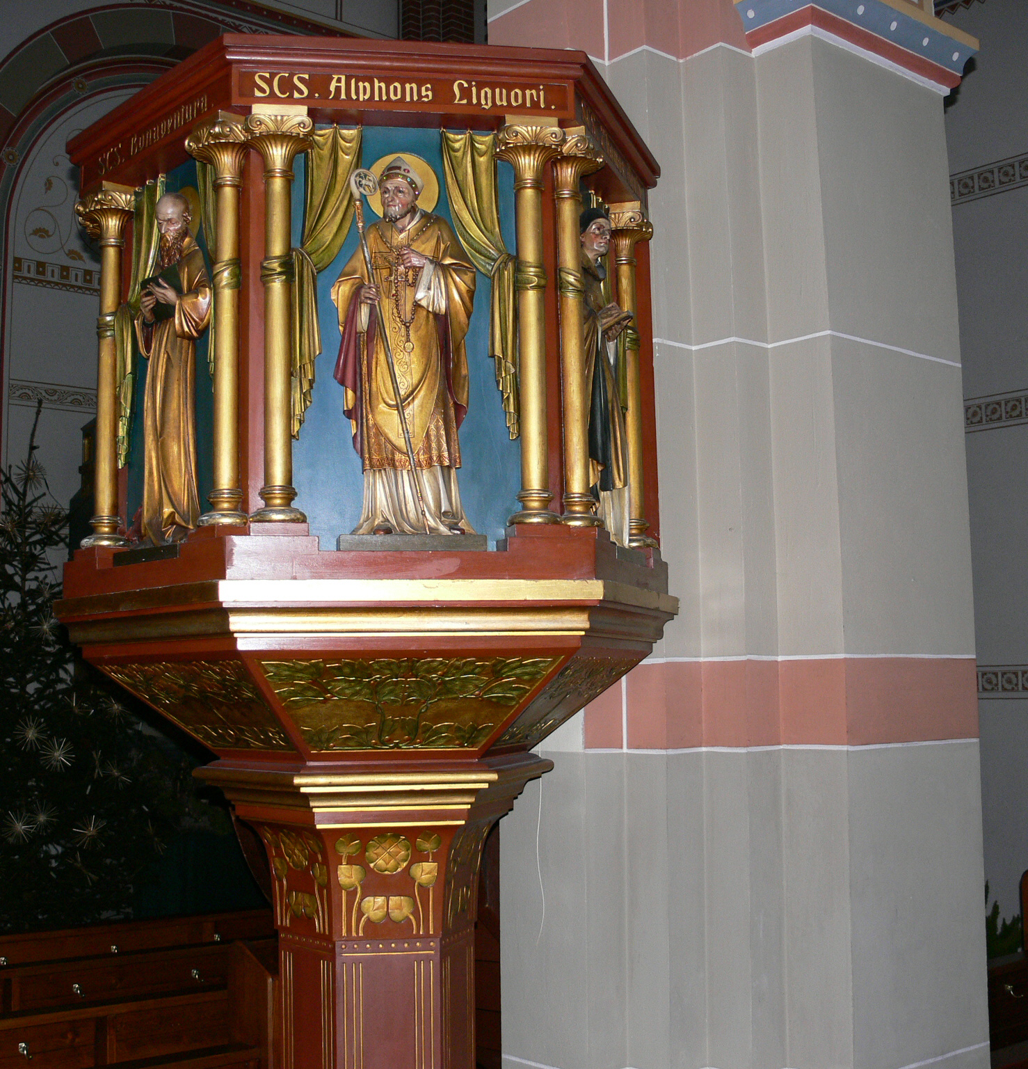 Pfarrkirche St. Martin, Hundersingen, Kanzel von Gebhard und Franz Müller (Saulgau), 1906, mit Figur des hl. Alfons von Liguori